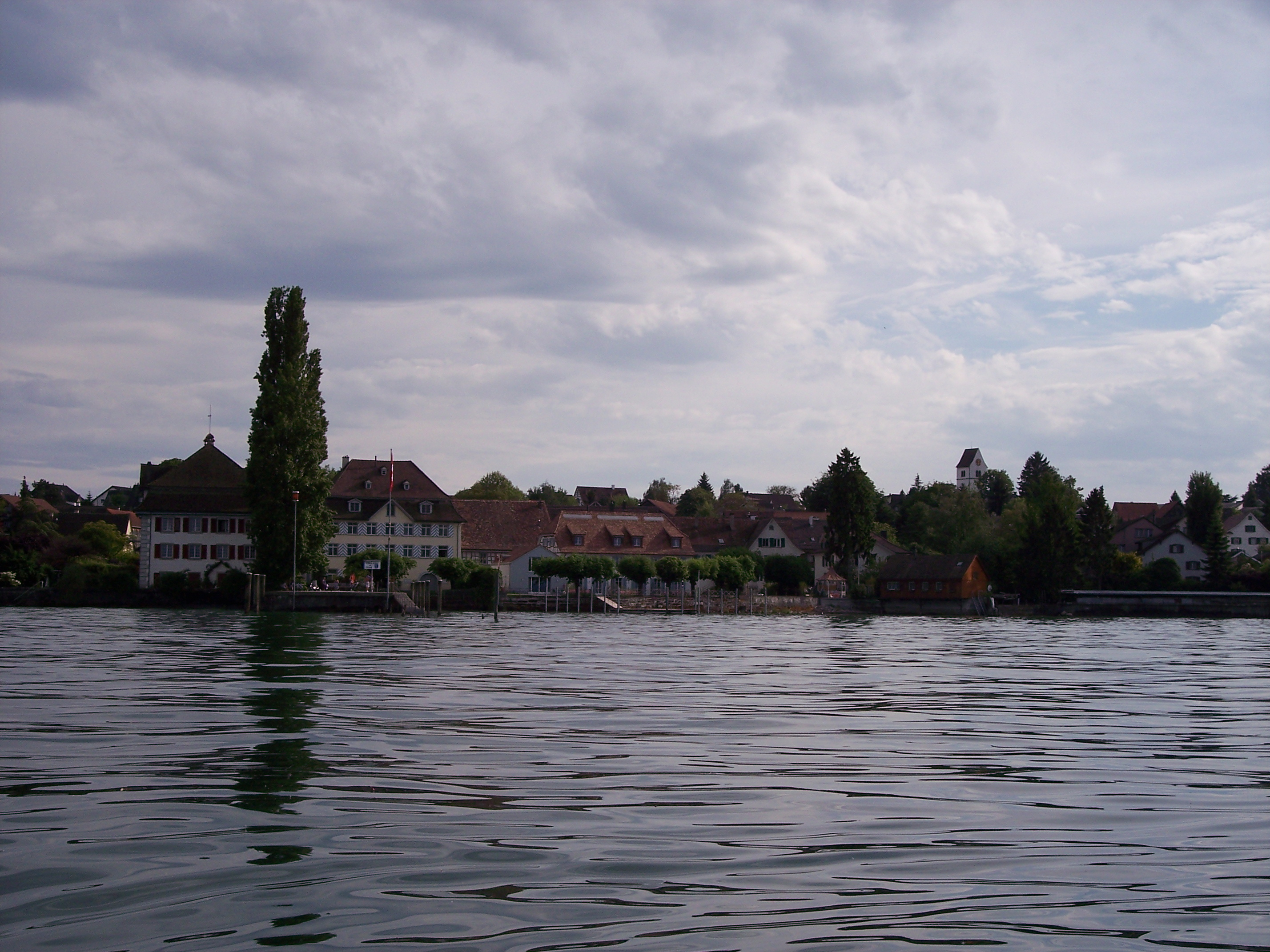 Seedorf Uttwil - vom Bodensee her aufgenommen